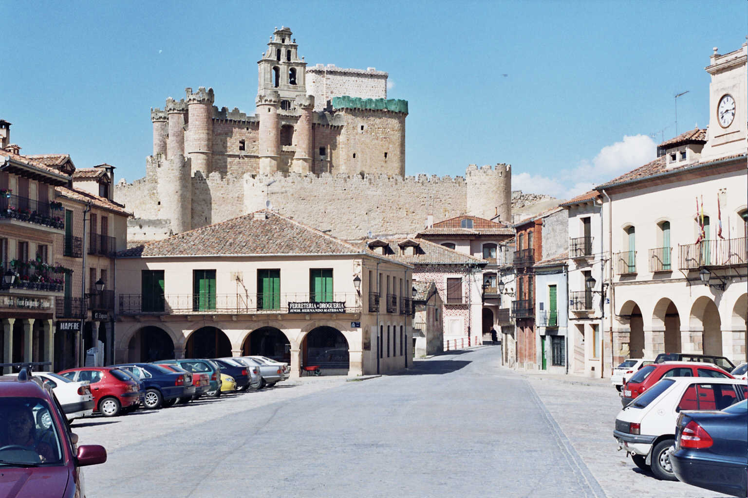 Segovia. (Castilla-León. España) Turégano. Plaza Mayor y Castillo. Fotografía realizada el 21 agosto de 2002 por el autor.User:Pelayo2.